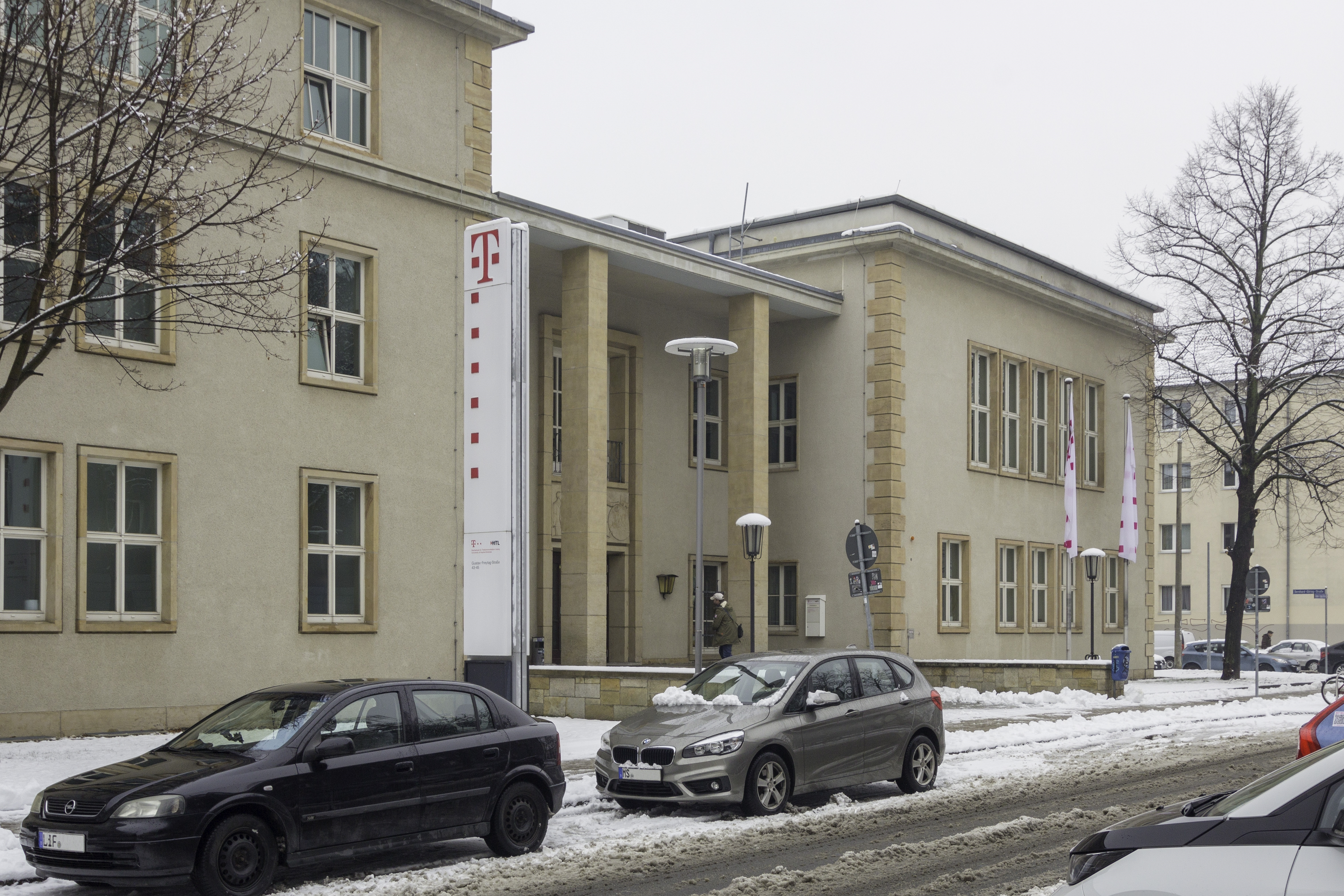 Hier wird der Vordereingang der Hochschule der Deutschen Telekom AG (HfTL) während der Präsenzphase der dualen Studenten dargestellt.